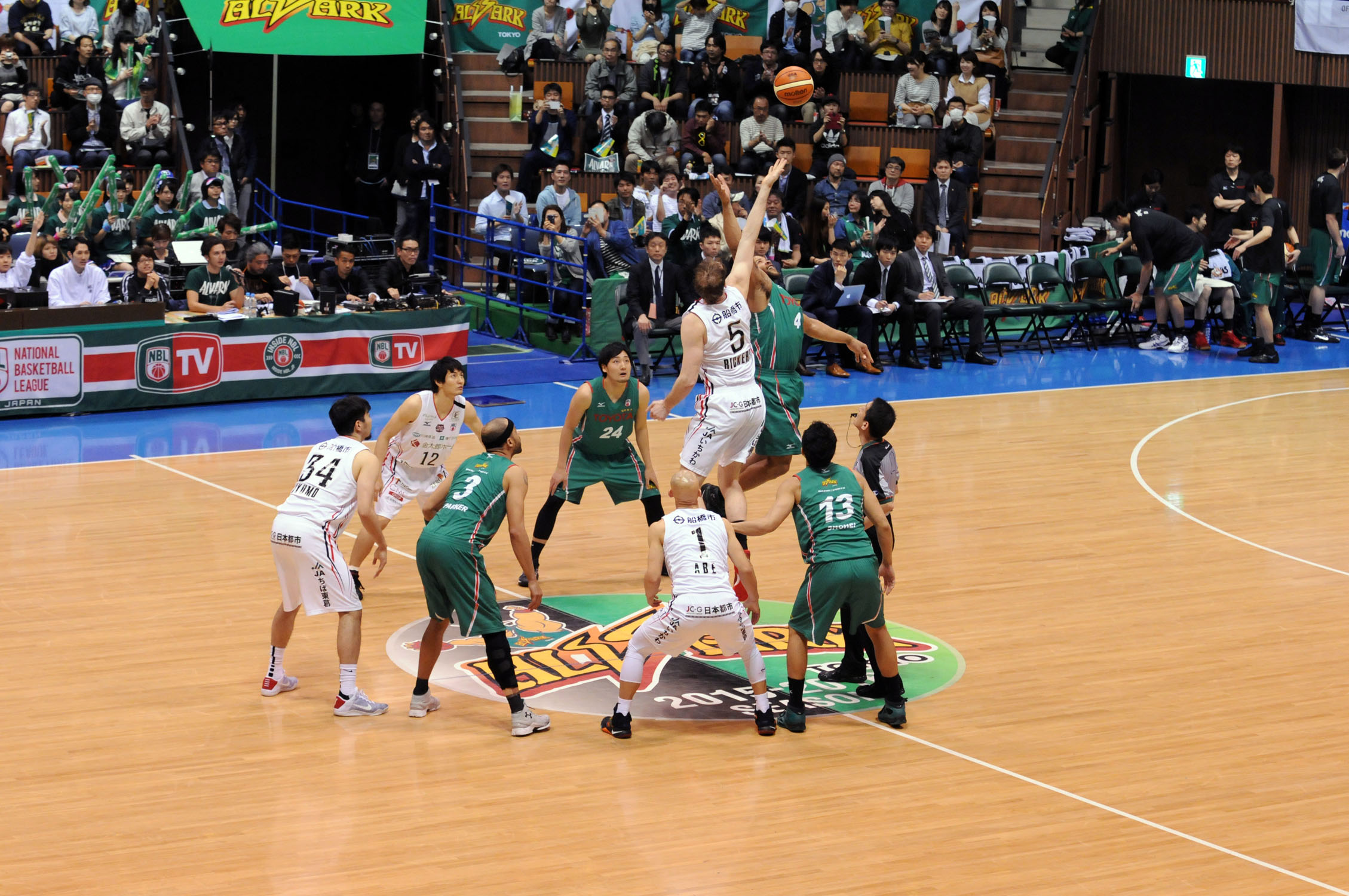 NBL 2015-2016シーズン、トヨタ東京対千葉ジェッツ。国立代々木競技場第二体育館。